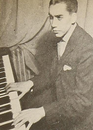 Vicente Bianchi Alarcón en 1943. Vicente Bianchi (Ñuñoa, Santiago, 27 de enero de 1920) es un destacado compositor, pianista y director de orquesta y coros chileno.